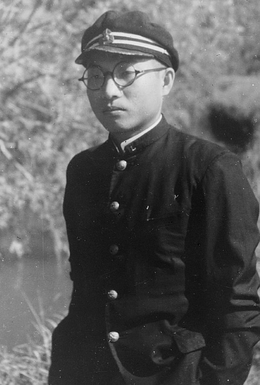 葉英堃著臺北高等學校制服之寫真。